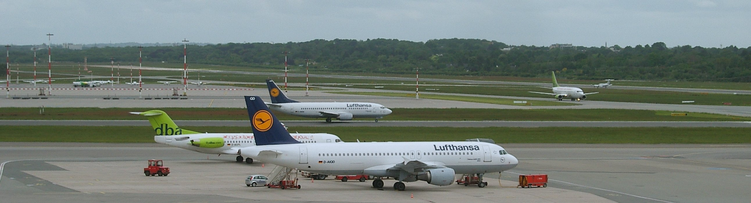 Hamburg, Fuhlsbüttel, Flughafen, Blick von der Terrasse Terminal 1